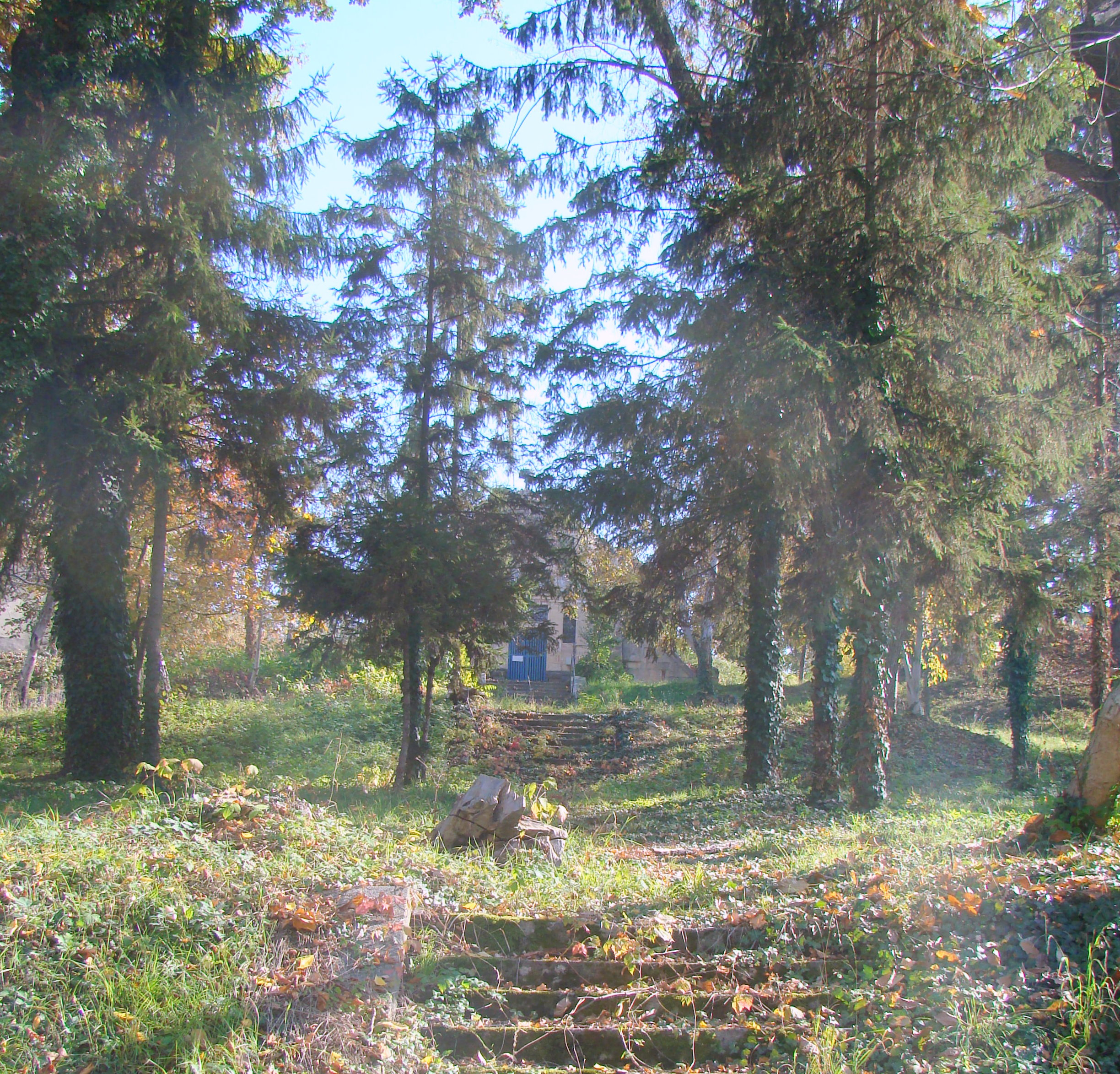 Uzina de apă și parcul, municipiul Târgu Mureș, str. Verii 4 1908 - 1909